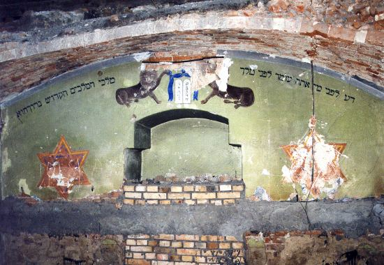 Dąbrowa Tarnowska - wnętrze synagogi